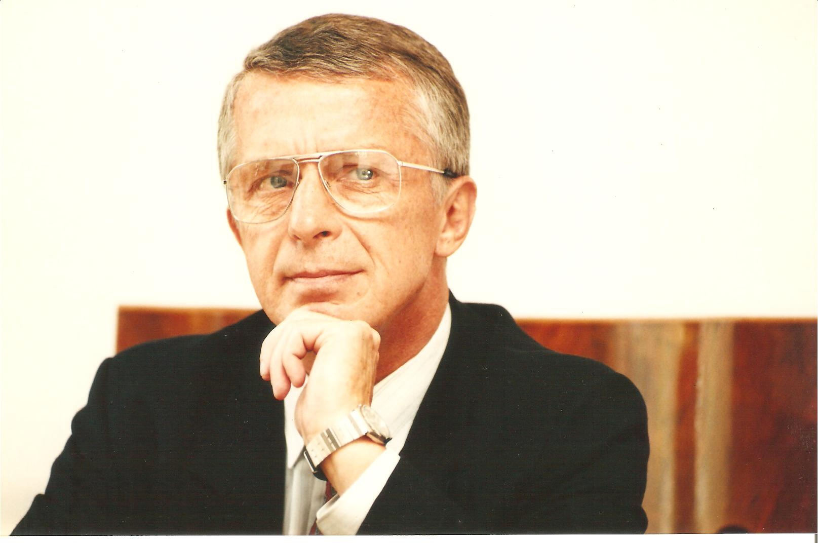 Prof. Lech Falandysz, prawnik.